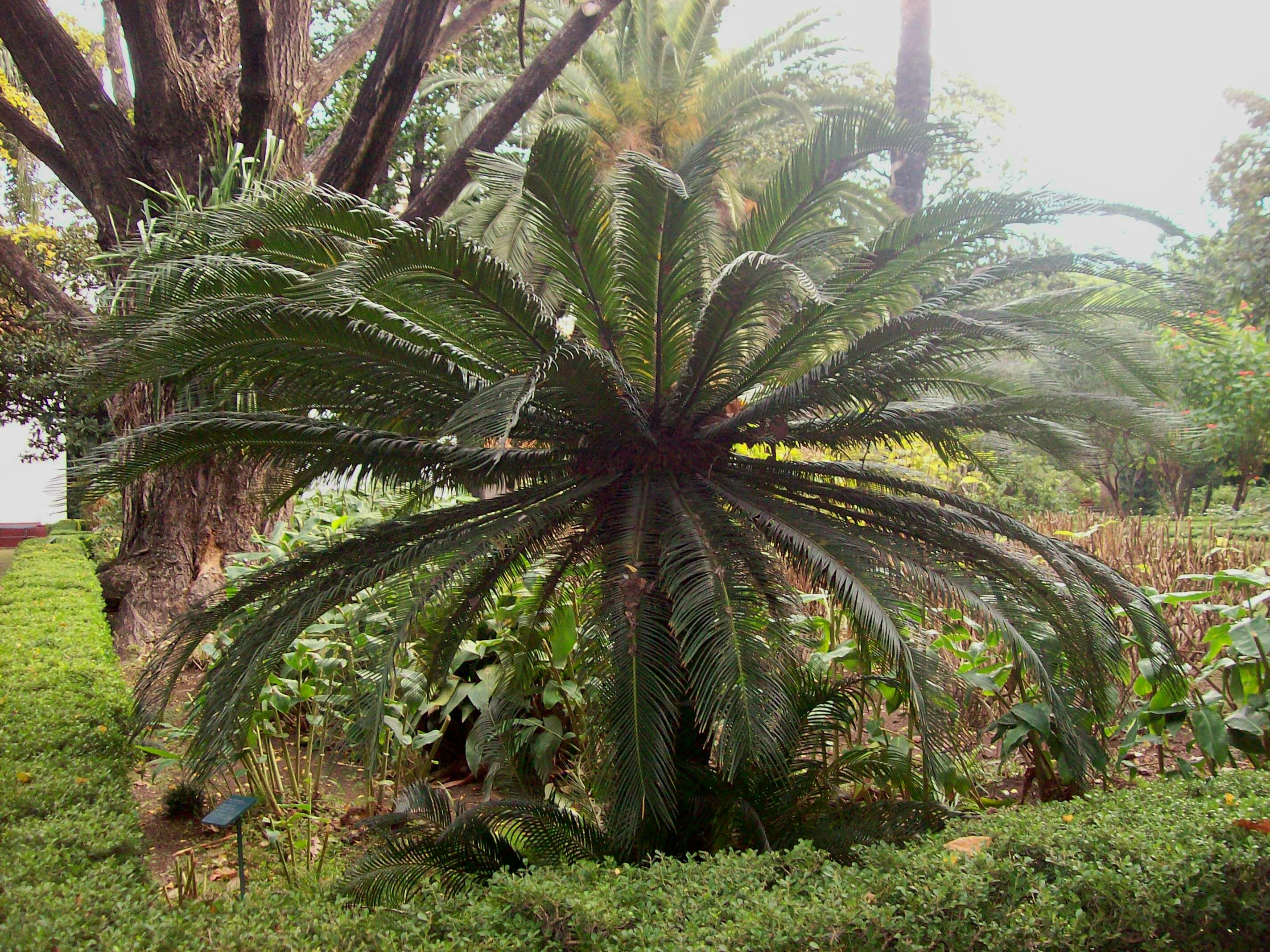 Cycas Revoluta, conocida también popularmente como "Cica", en el Museo Larreta, Buenos Aires, Argentina.